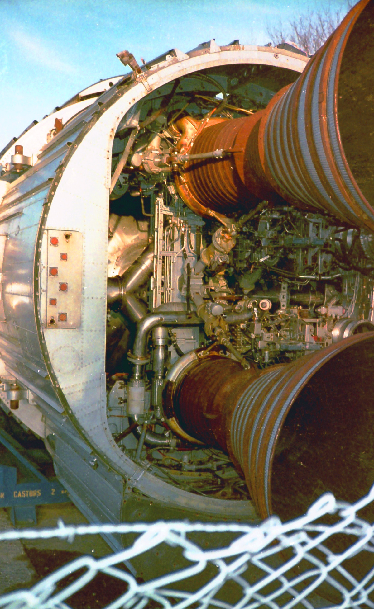 ancienne fusée Europa (Redu) en plein champs